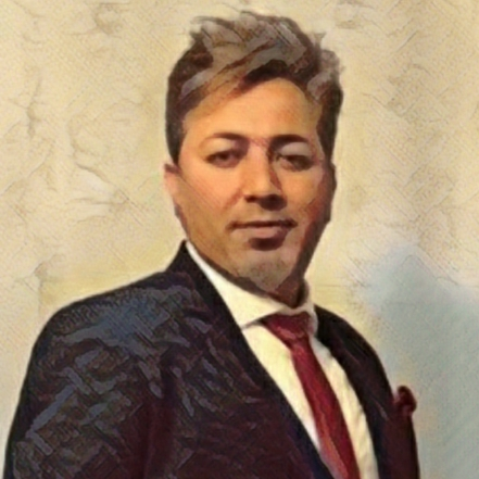 رامان عالی پور ، کارگردان و استاد بازیگری